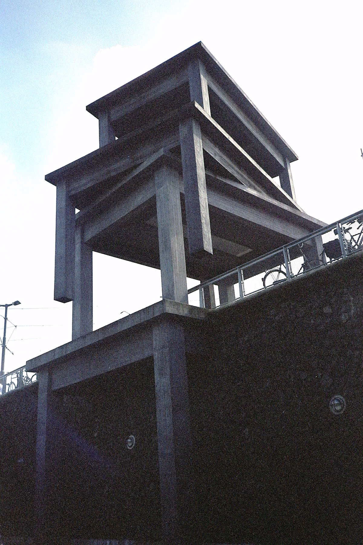 Voor de bijen, een kunstwerk van Frank Mandersloot, 2004, bij het Rietlandpark in Amsterdam